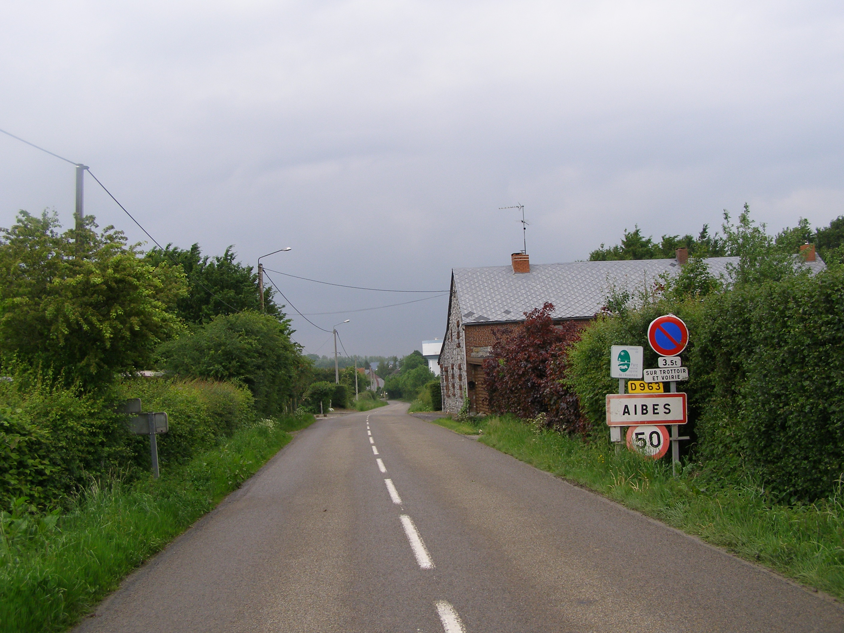 Une des entrées du village.